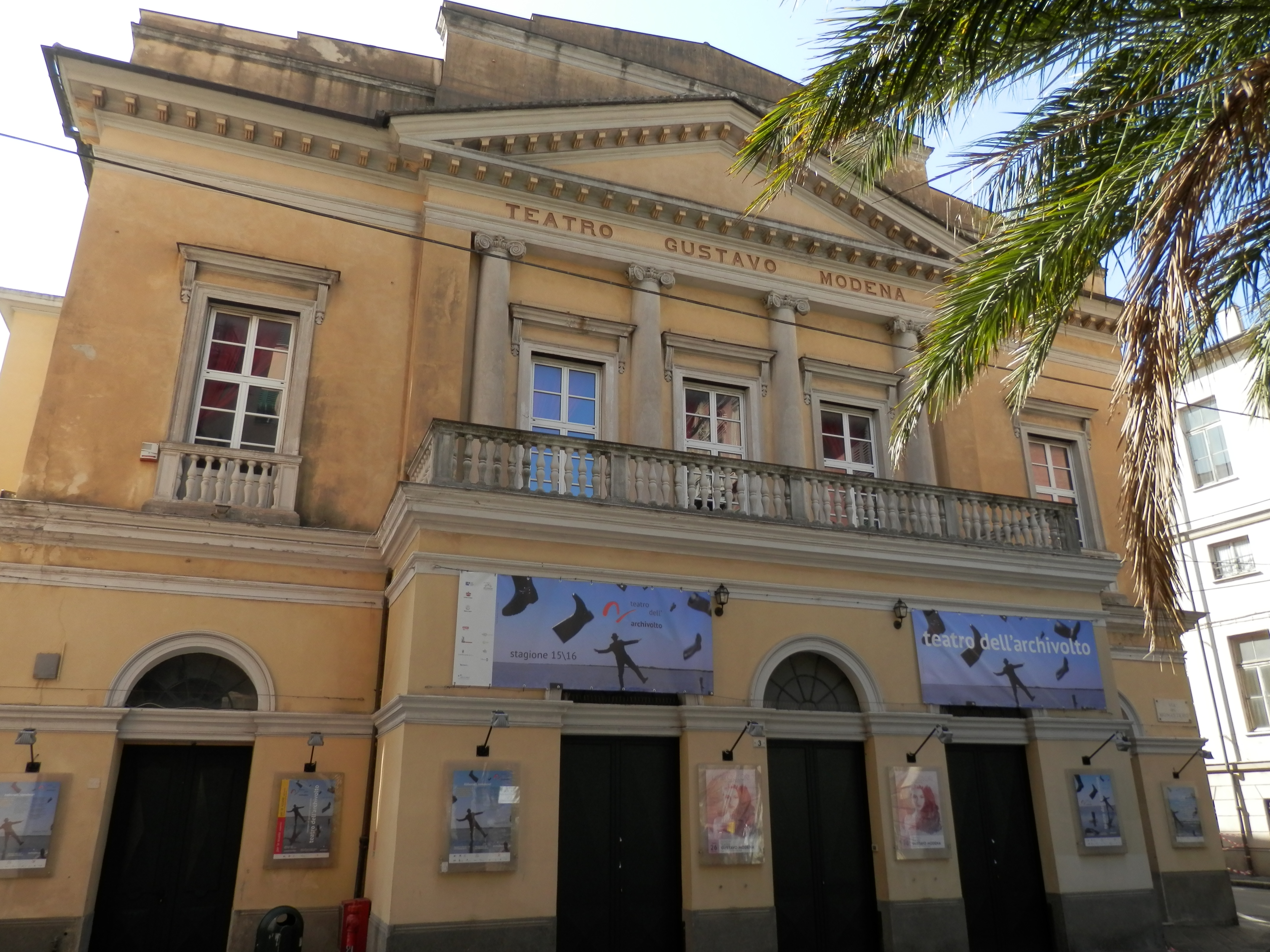 Teatro, si trova nella piazza omonima a San Pier D'Arena